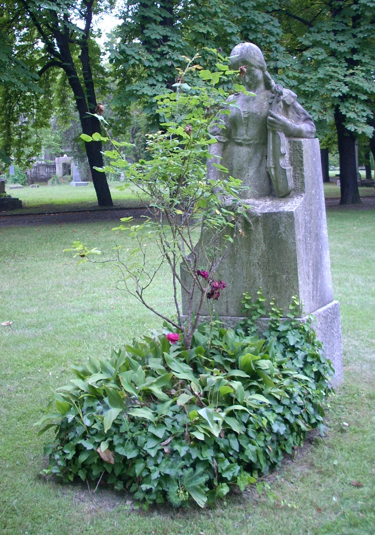 Szentirmay Elemér sírja a Fiumei úti Nemzeti Sírkertben (Budapest)